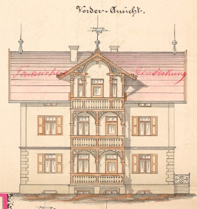 Bauplan